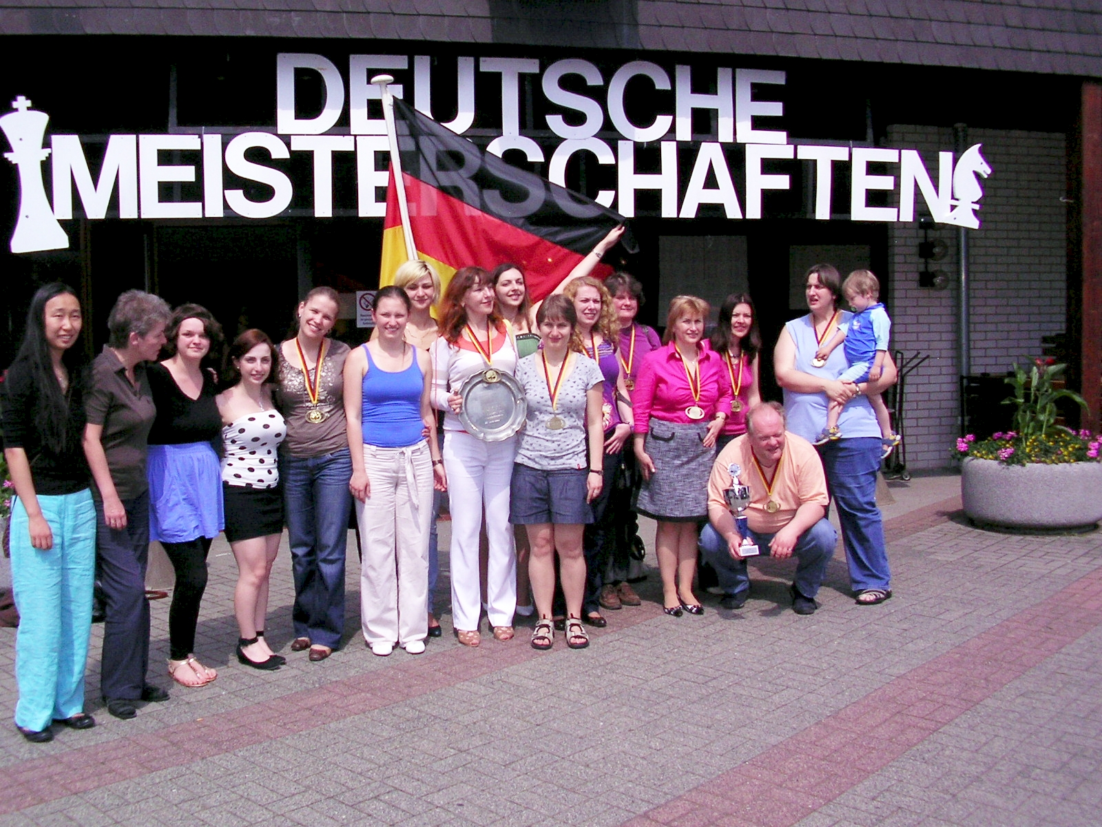 Die Siegermannschaft aus Nordrhein-Westfalen, Deutsche Frauen-Länder-Mannschaftsmeisterschaft 2010 in Braunfels. In der Mitte (mit Teller) Anna Dergatschova-Daus. Von links nach rechts im Einzelnen: Fan Zhang, Isabel Hund, Anna Karmann, Swetlana Roitburd, Julia Freitag, Elvira Mass, Viktorija Sokalska, Anna Dergatschova-Daus, Marina Roitburd, Oksana Vovk, Jevgenija Leveikina, Irina Nattermüller, Olga Lopatin, Anna Rudolph, Stefan Pick, Heike Vogel und Max.